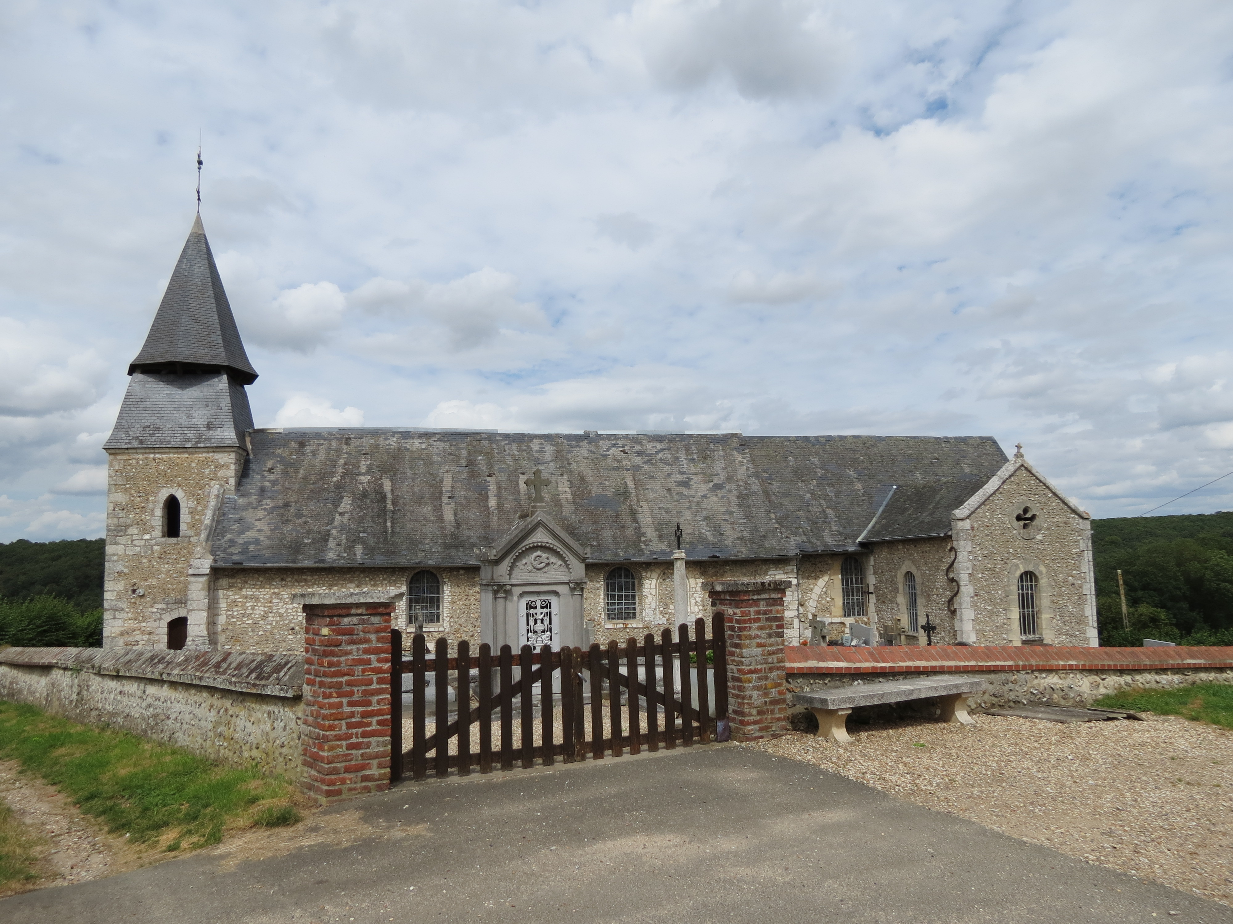 Eglise Saint-Pierre d'Amfreville-les-Champs